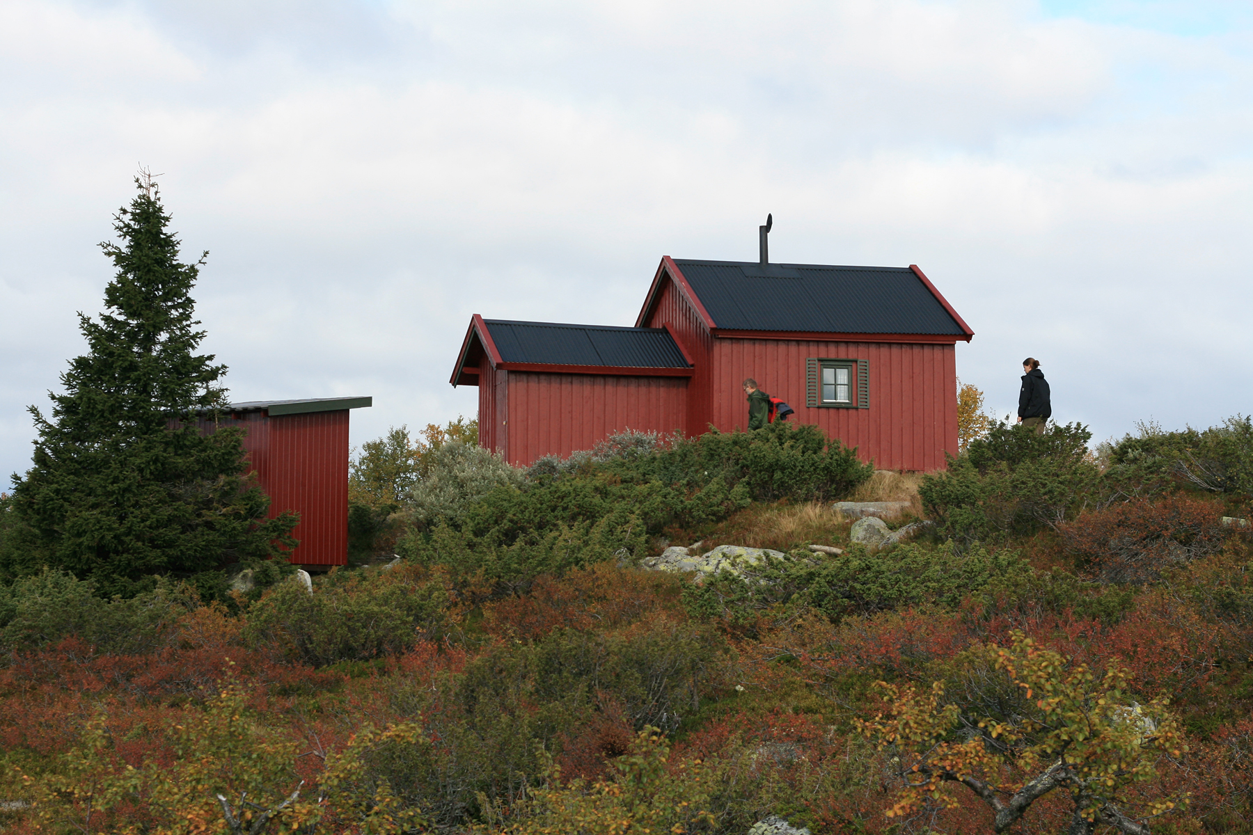 Godlidalshytta på Rondanestien, Ringsaker.